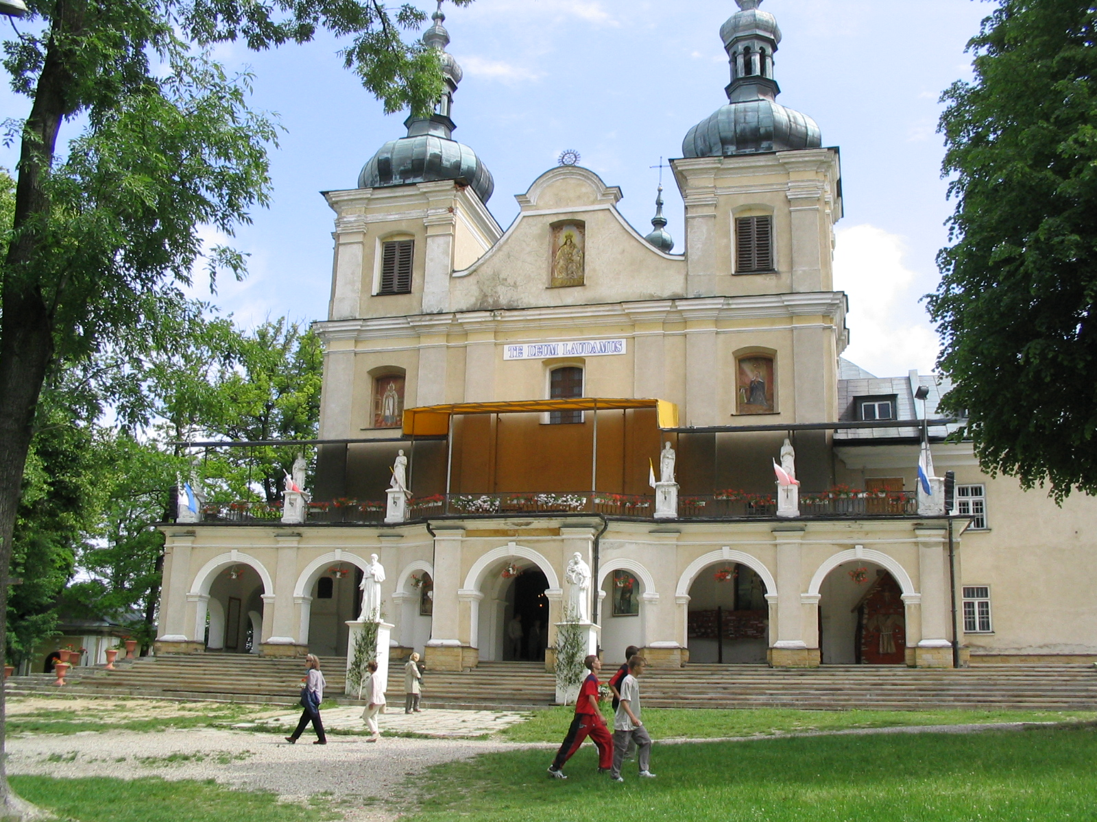 Kalwaria Pacławska. Autor zdjęcia. :Goku122